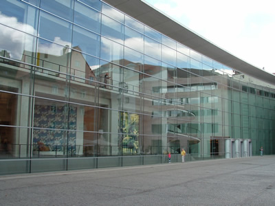 Neues Museum Nürnberg - Selbst fotografiert - GNU FDL